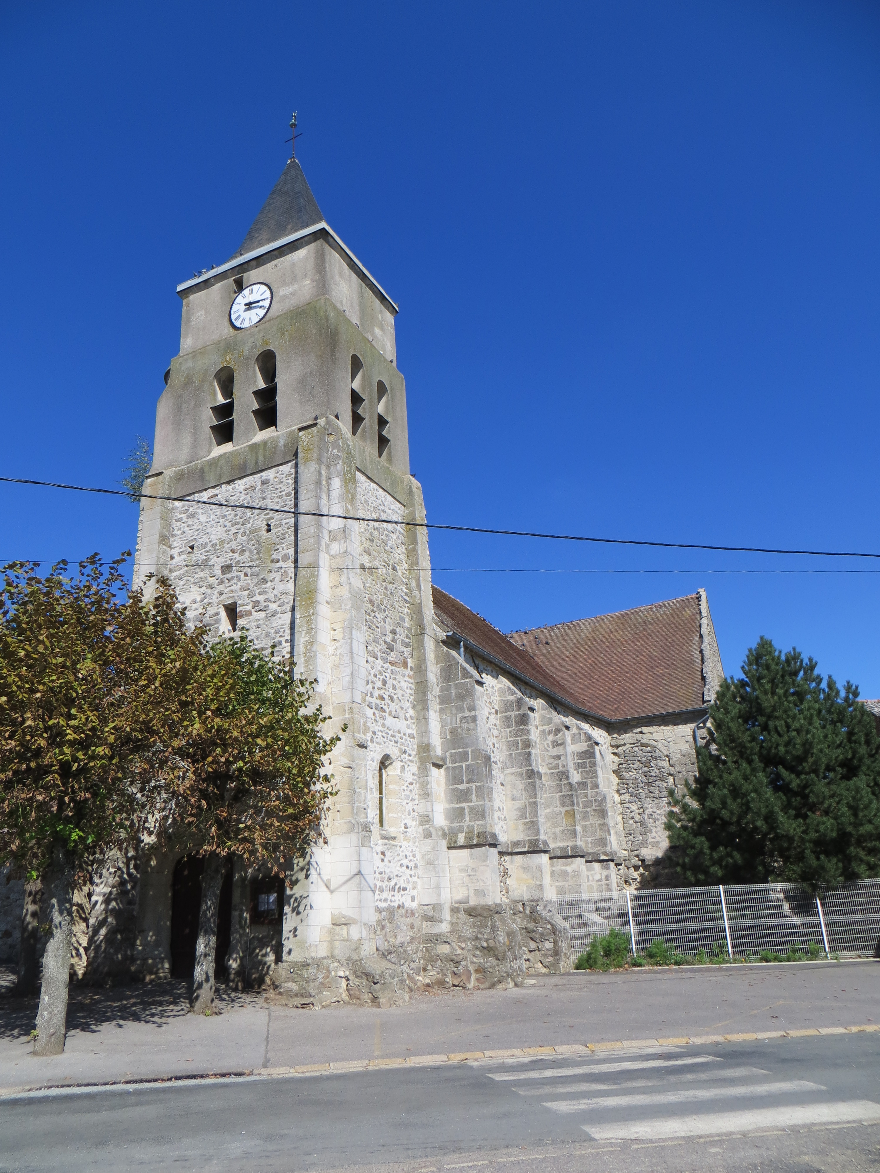 Vue de l'église